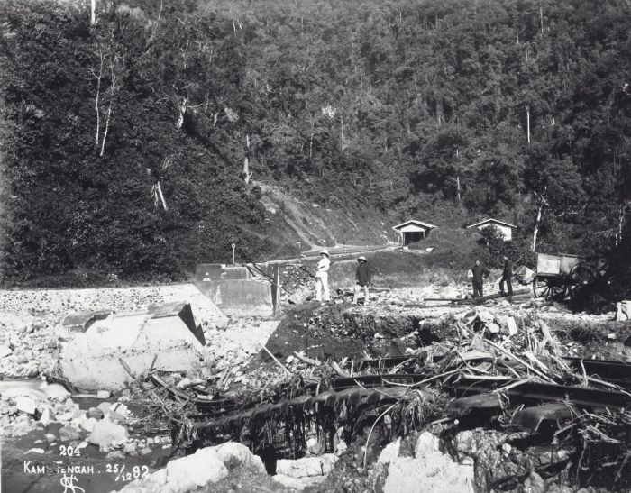 foto. Station "Kampong Tangah" tijdens de verwoesting Anaikloof, Pad. Bovenlanden